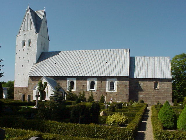 Borris Kirke set fra sydlig retning